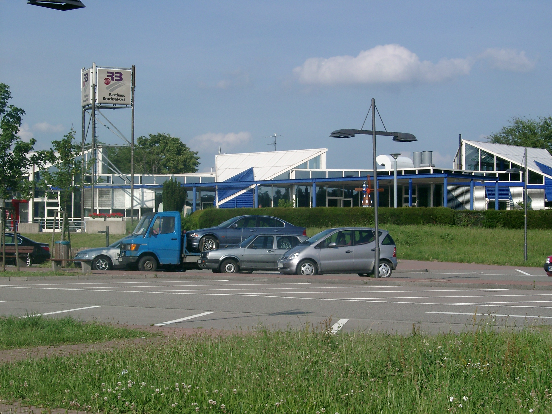 BAB Raststätte Bruchsal Ost an der Bundesautobahn A5